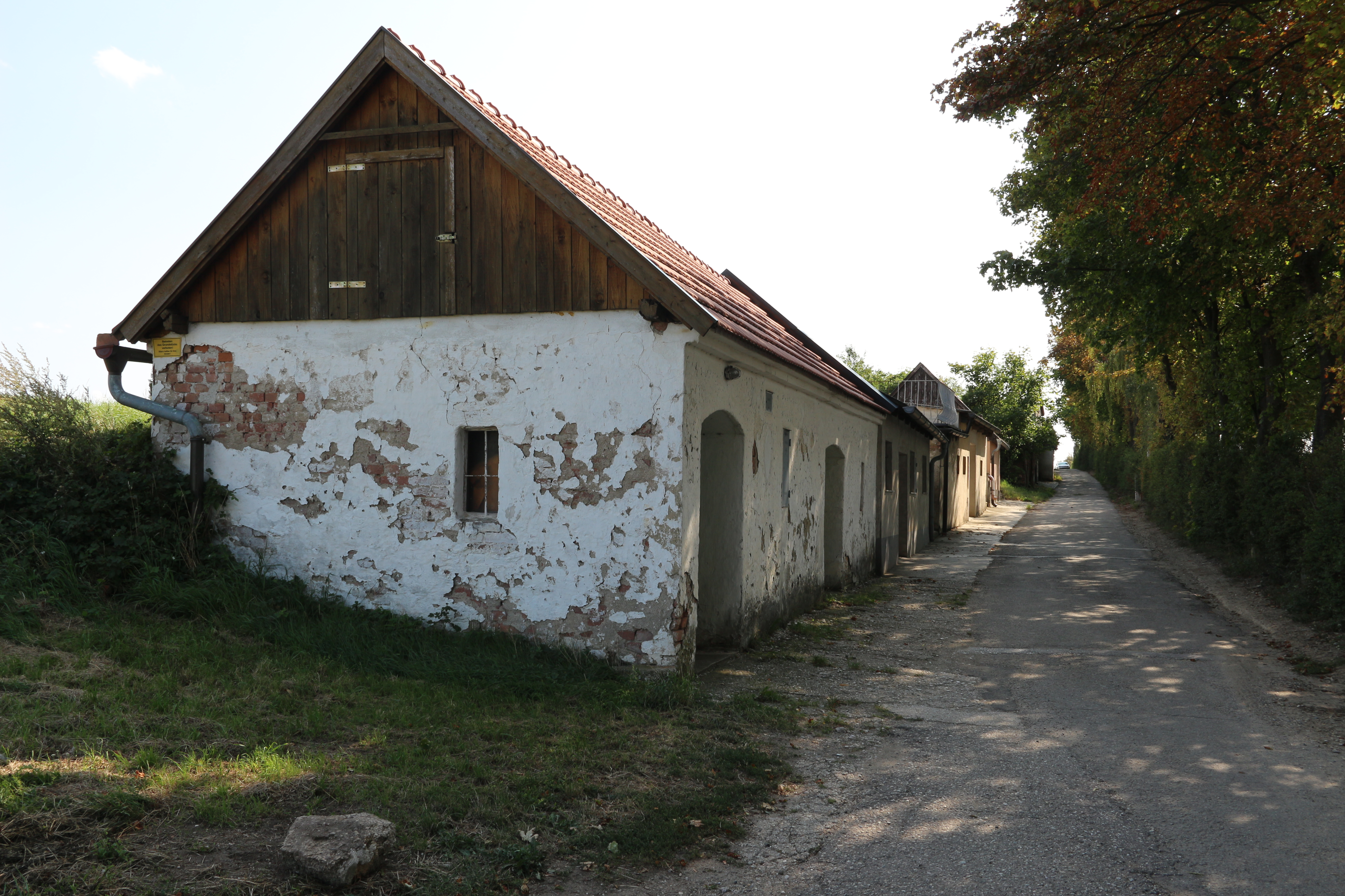 Kellergasse Kleinhaugsdorf in Haugsdorf, Niederösterreich.